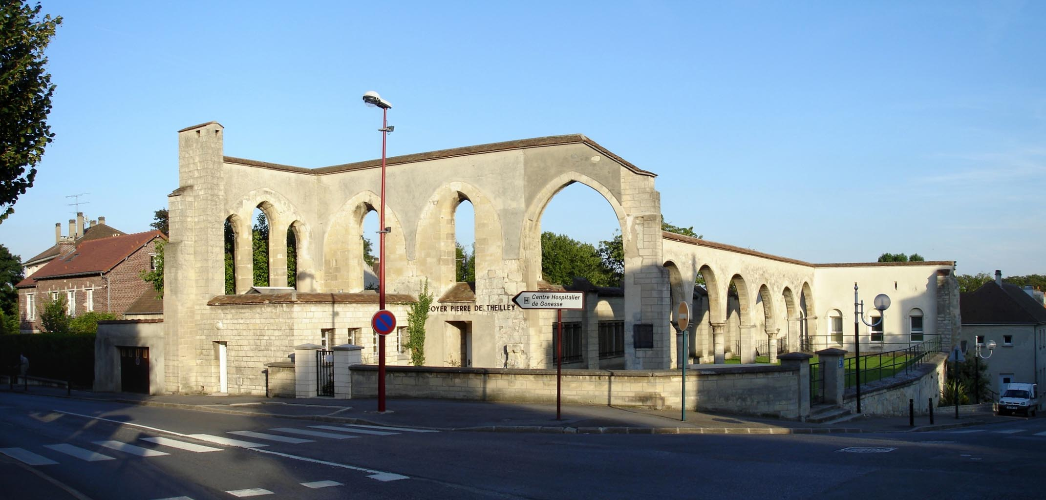 Ancien hôtel-Dieu, actuel foyer Pierre de Theilley à Gonesse (Val-d'Oise), France